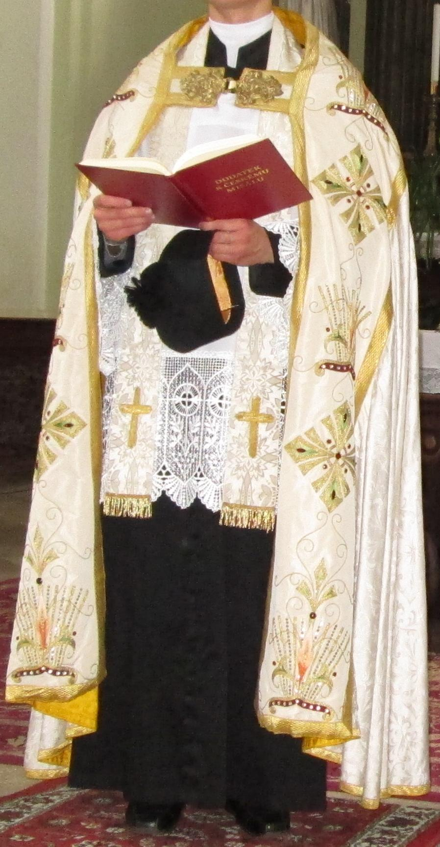 Bílý barokní pluviál